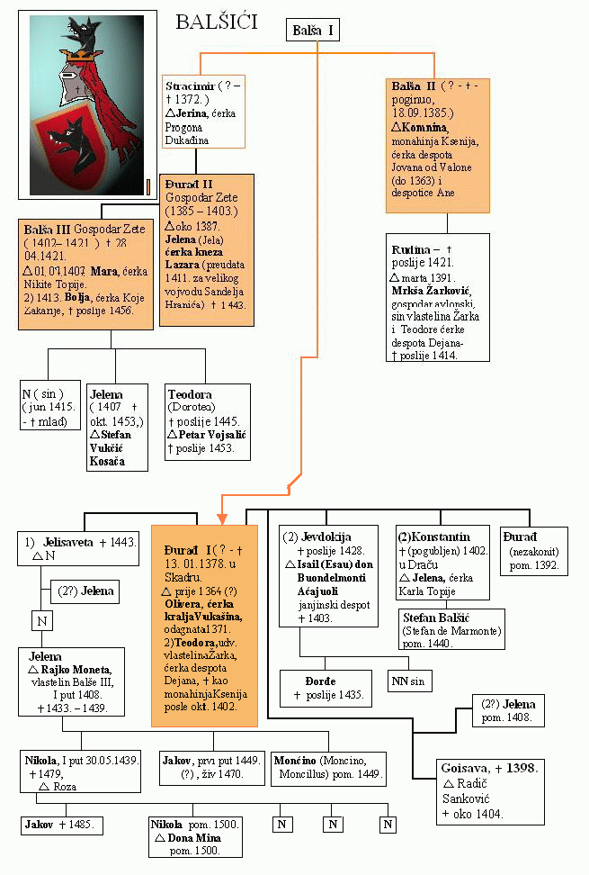 Dinastija Balsica.